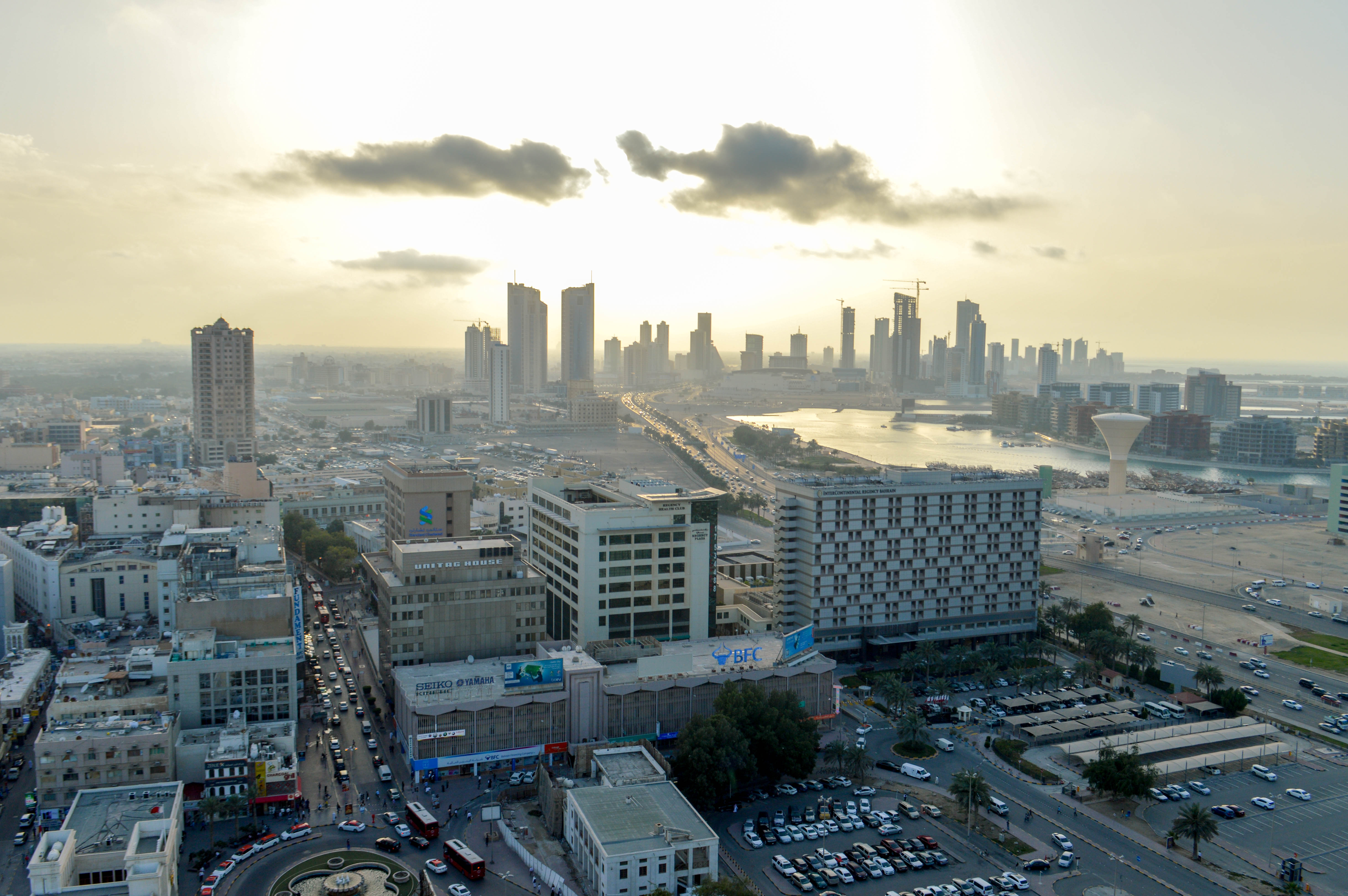 Late afternoon in Bahrain